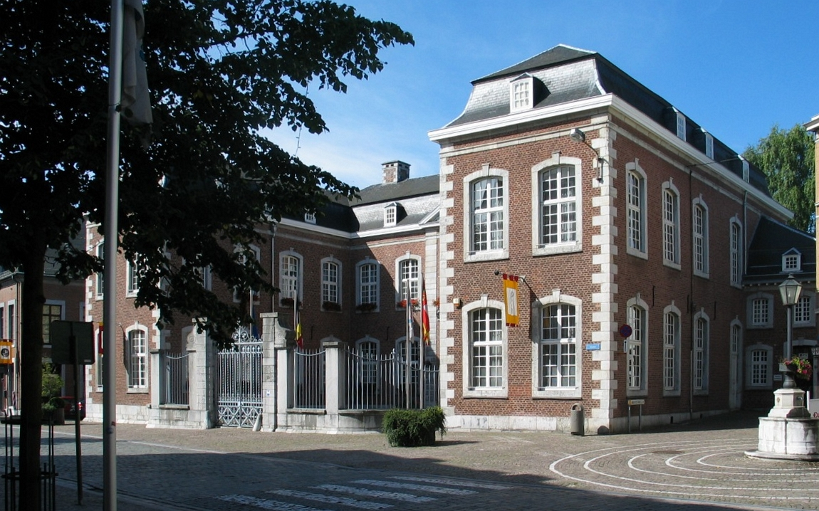 Haus Grand Ry in Eupen, auch „Alte Post“. Architekt vermutlich J.J. Couven. Seit 1984 Regierungssitz der Deutschsprachigen Gemeinschaft in Belgien